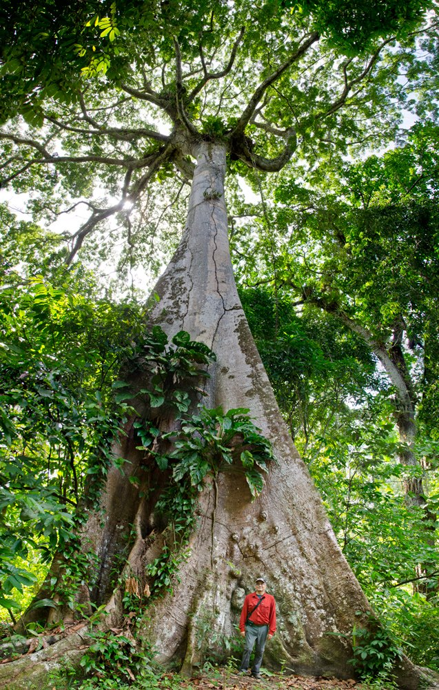 Árbol en el Amazonas, aparentemente inspiro el árbol de Avatar